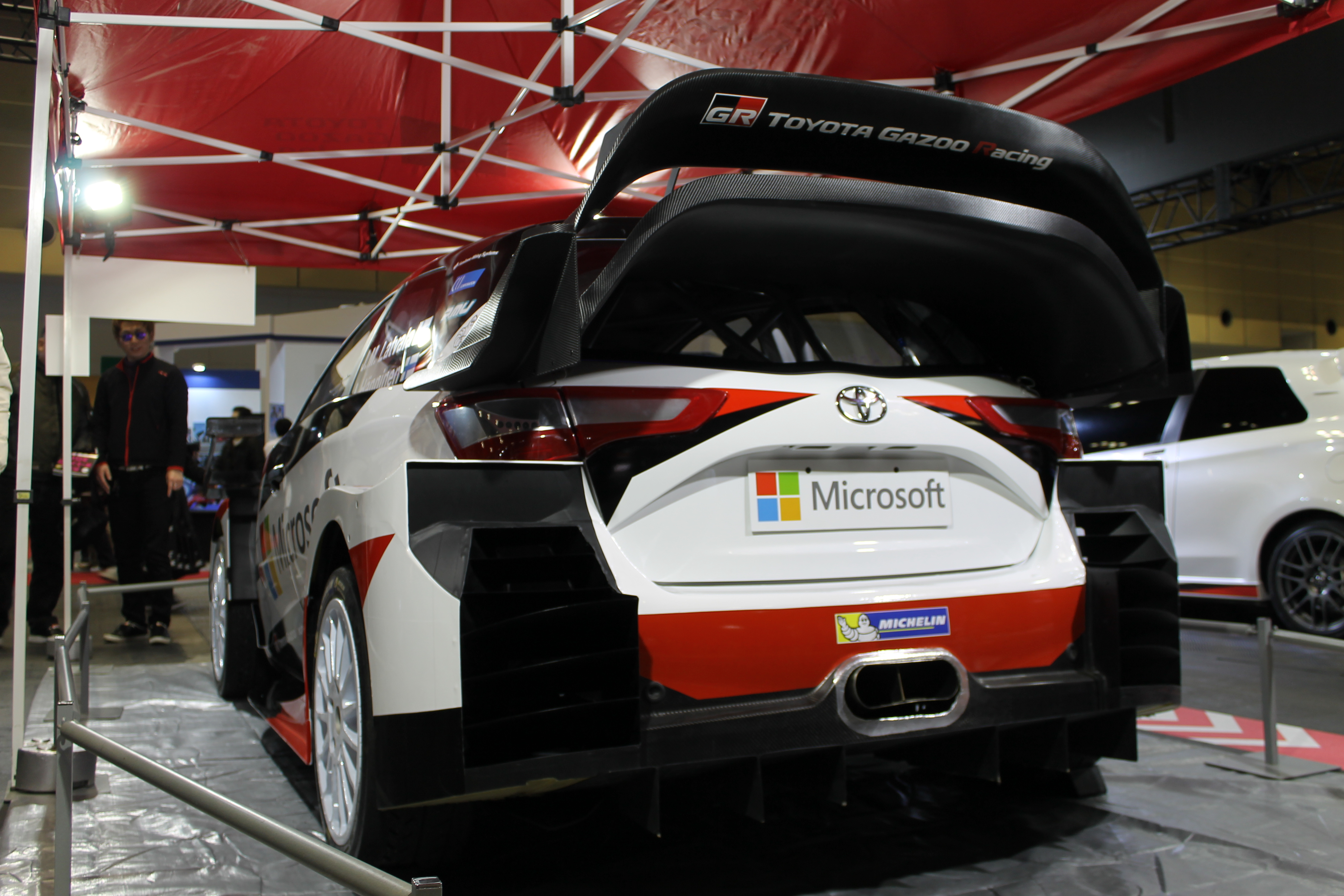 大阪オートメッセにて